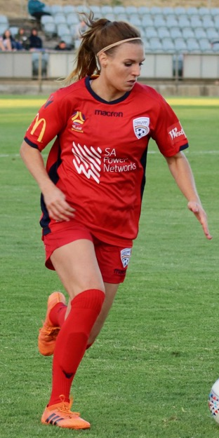 Rnd9AdeVic - Latsko